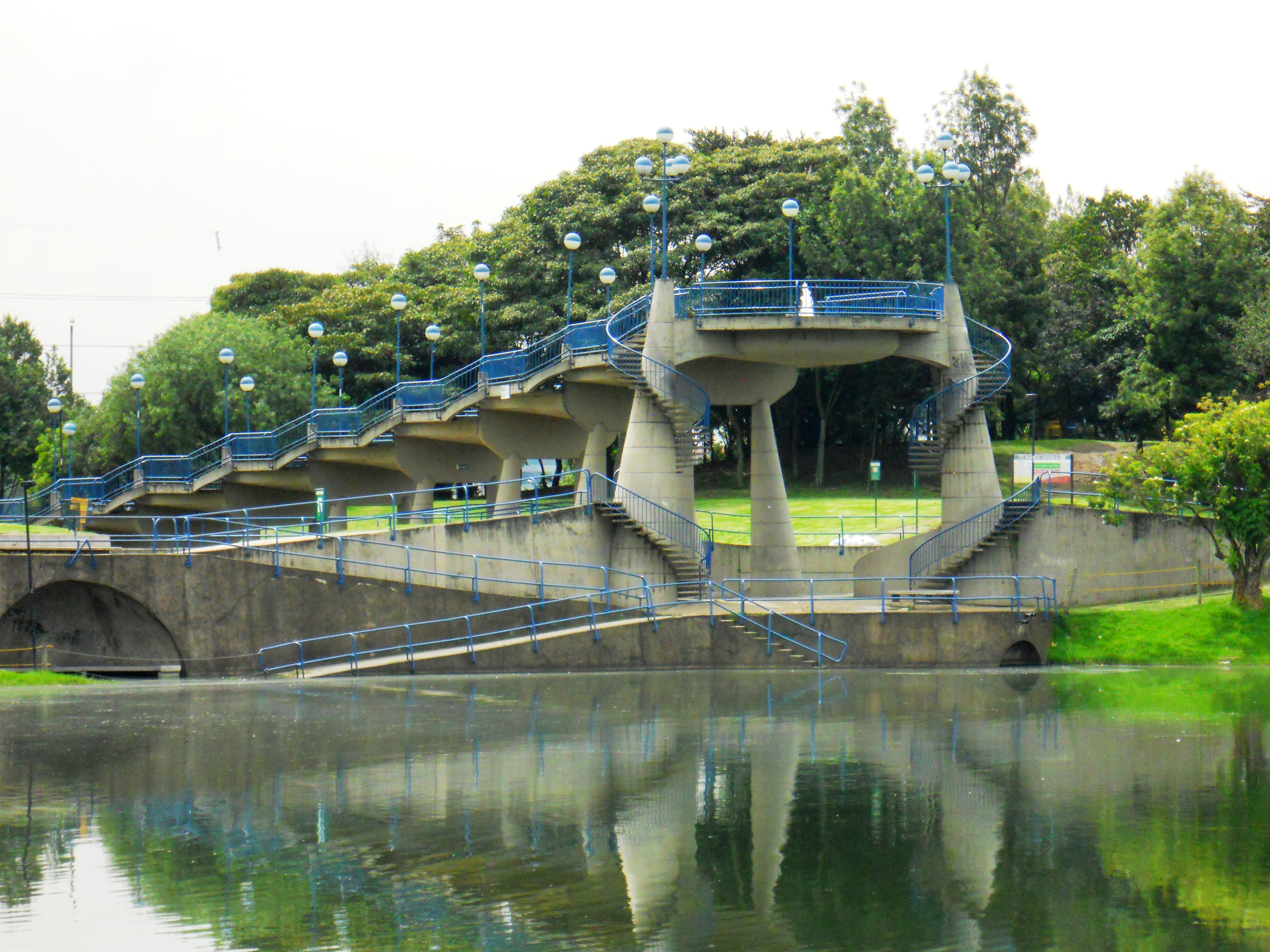 Cascada Parque Simón Bolívar.